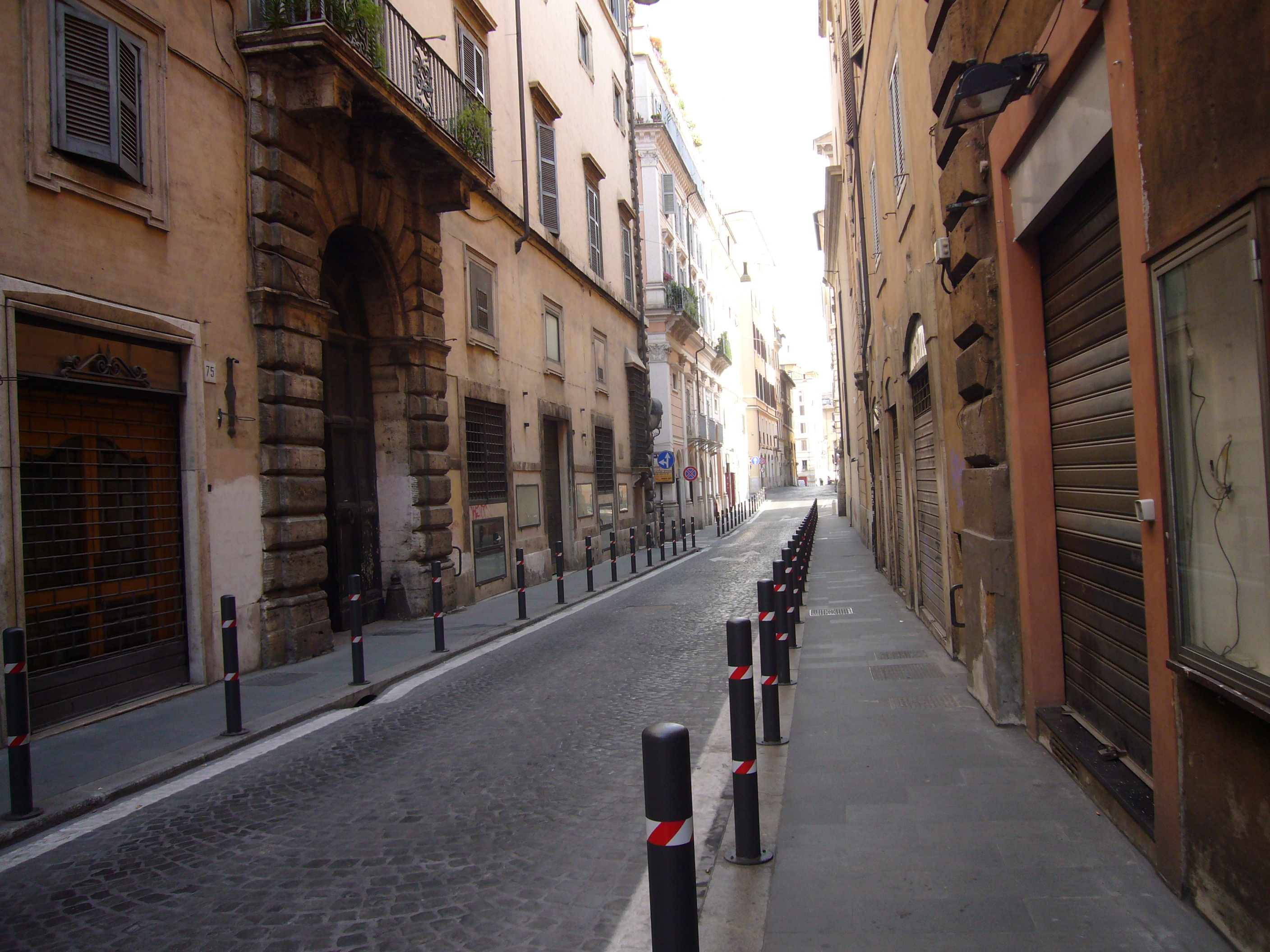 Roma, via della Torre Argentina a ferragosto